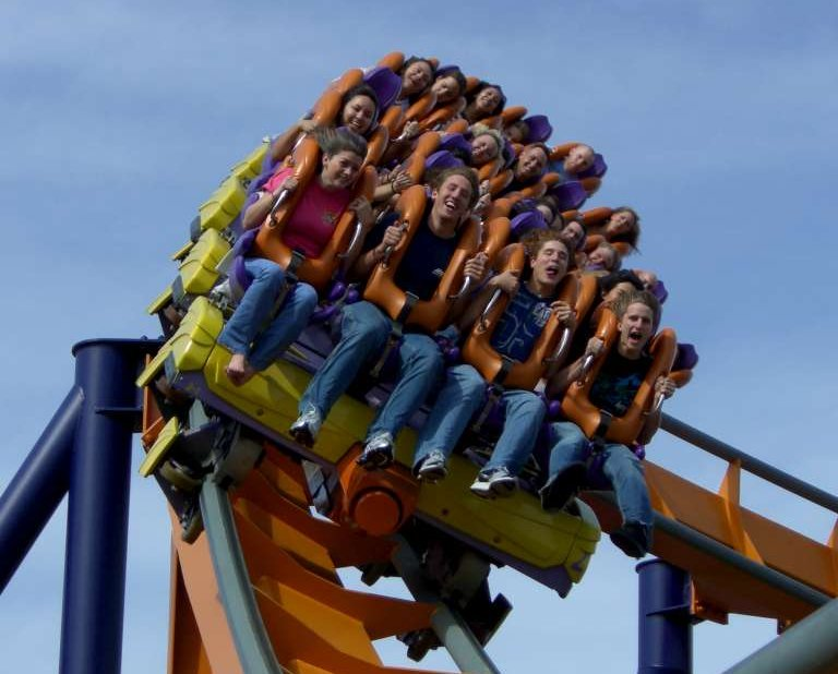 Dominator , montagnes russes à Kings Dominion